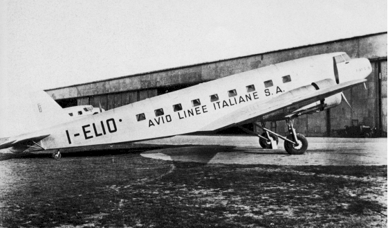 Avio Linee Italiane Fiat G.18